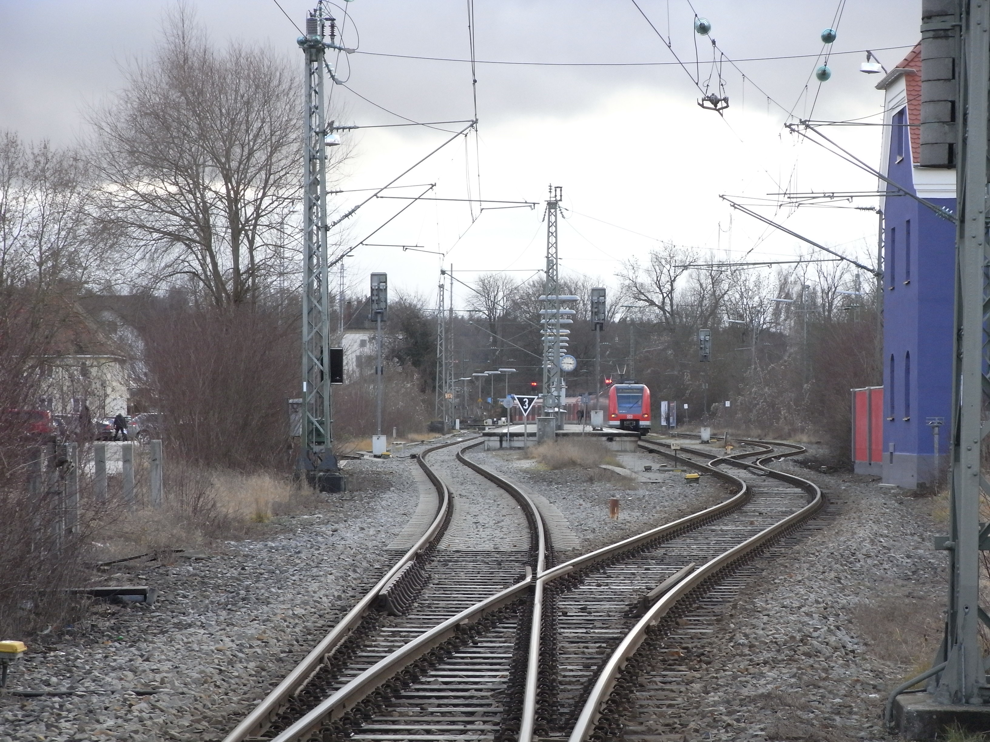 S-Bahnhof Herrsching, von Norden gesehen